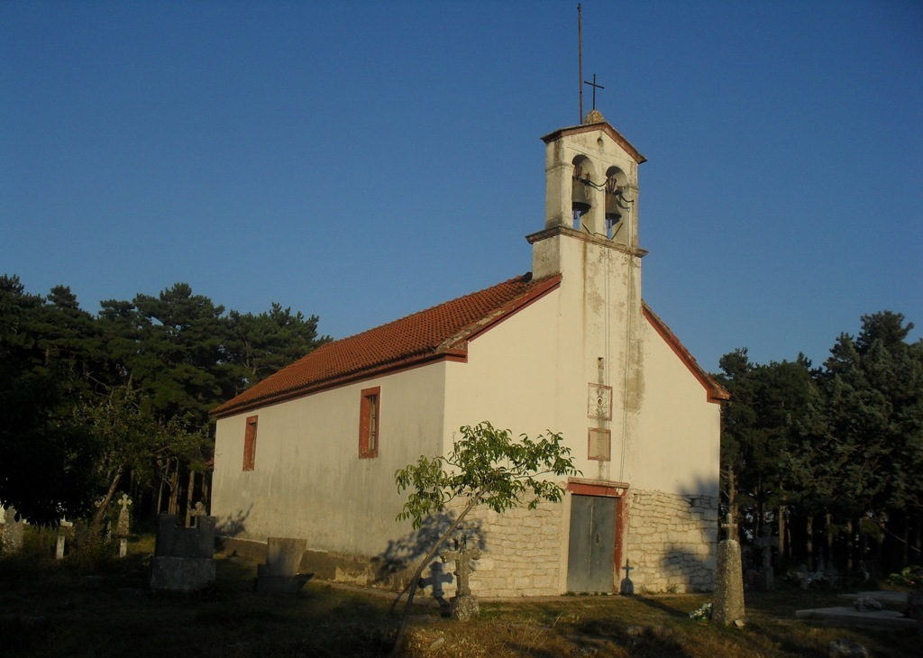 Храм СПЦ Свете Петке у Бјелини, Буковица, Далмација